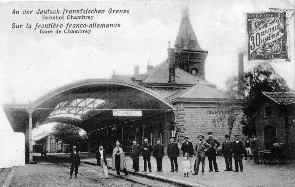 La gare avec sa verrière d'origine entre 1873 et 1918